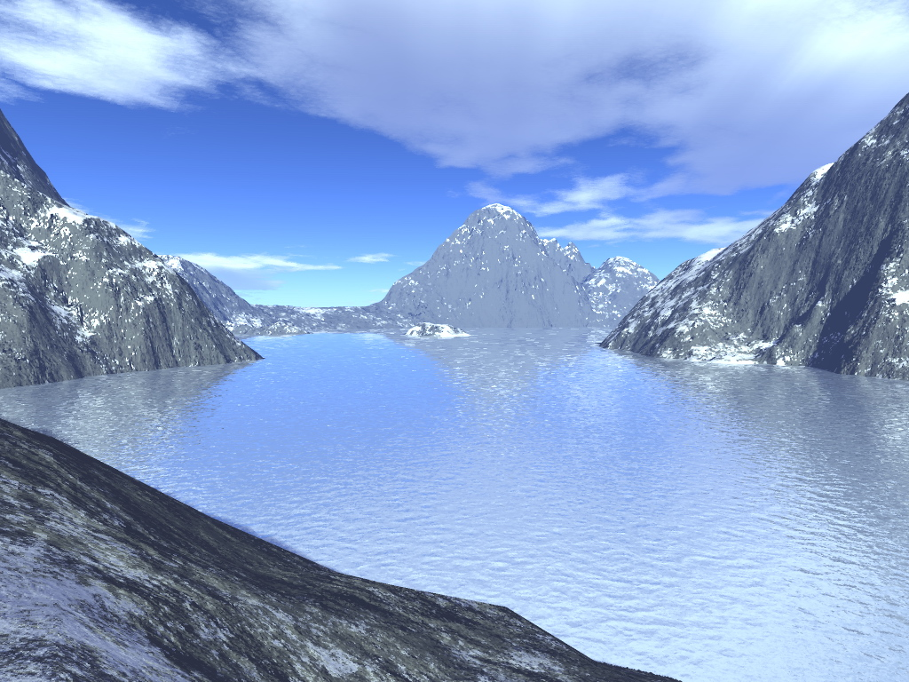 Wallpaper créé avec Terragen